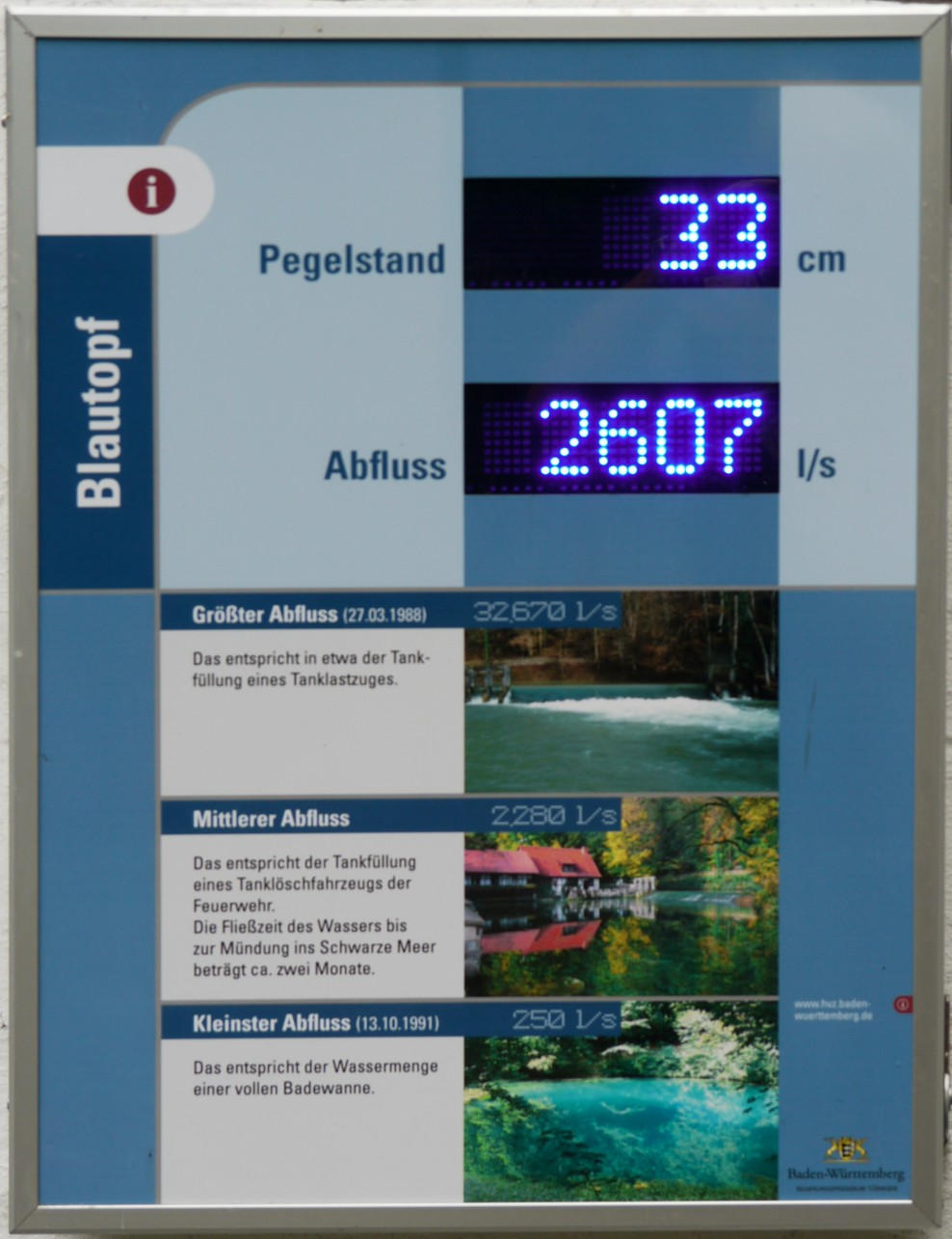 Anzeige der aktuellen Schüttung der Quelle